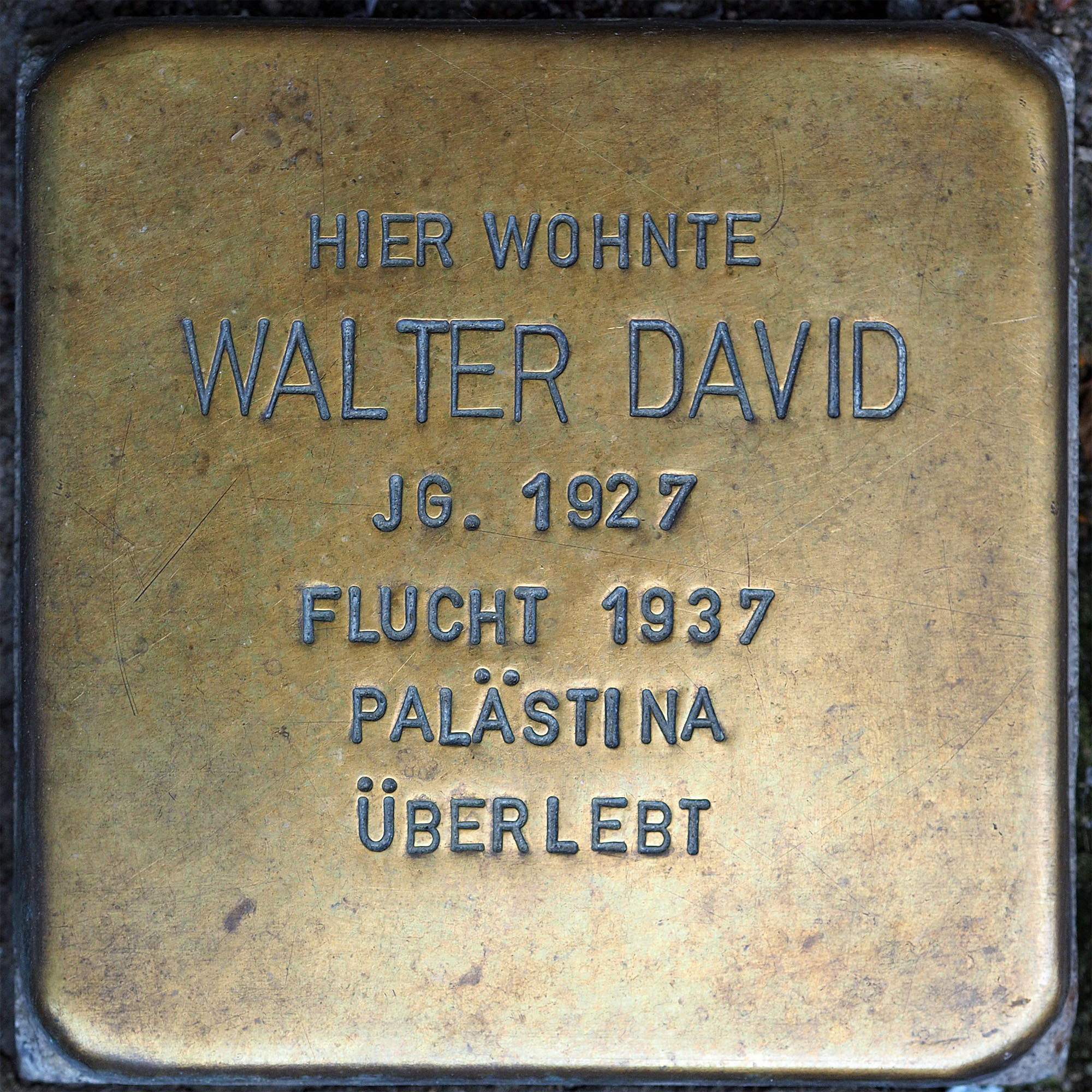 Stolpersteine Wesel: David, Walter